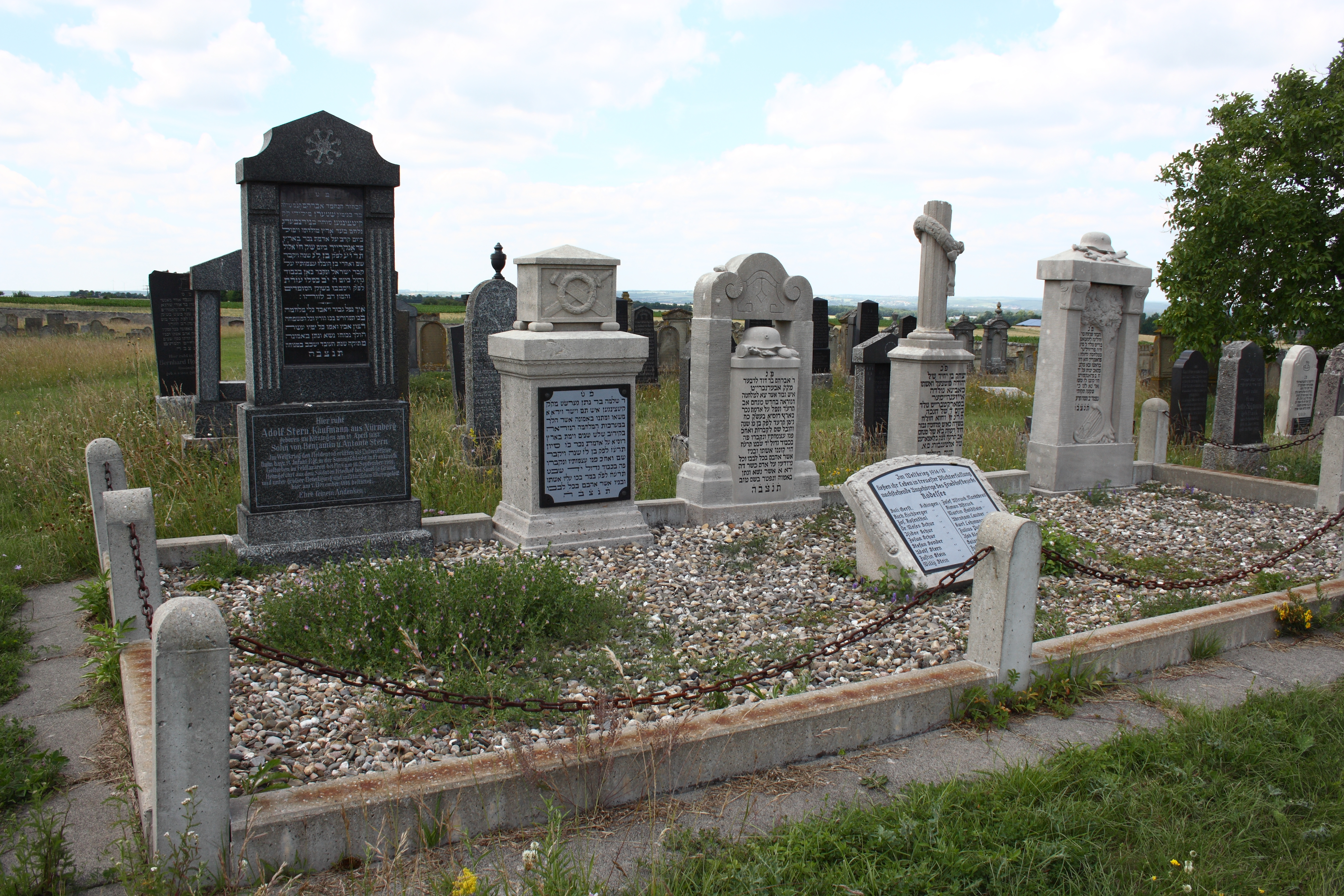 Jüdischer Friedhof in Rödelsee im Landkreis Kitzingen (Bayern)